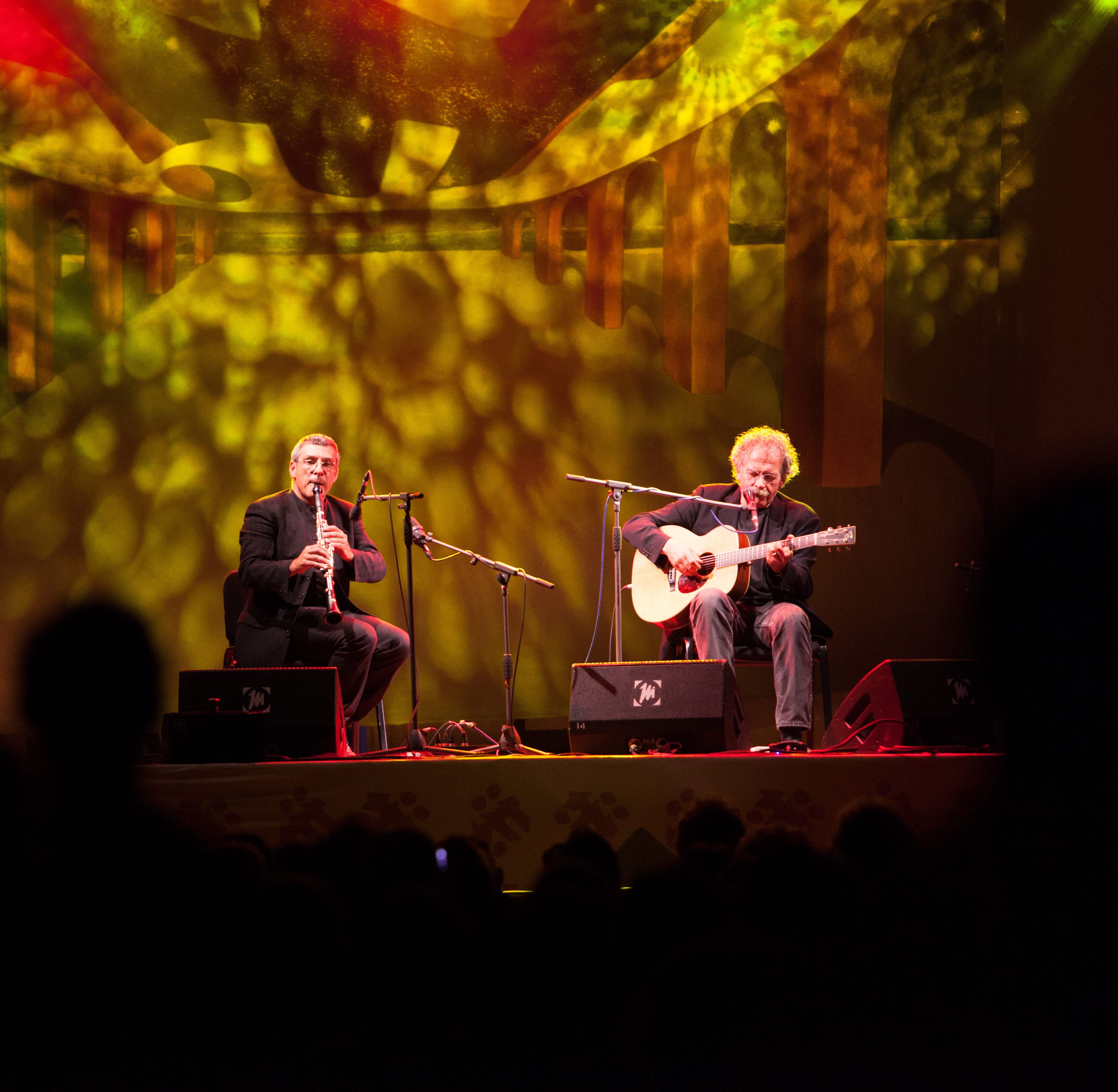 Gianmaria Testa e Gabriele Mirabassi in Rudolstadt 2013 Gianmaria Testa e Gabriele Mirabassi beim TFF Rudolstadt 2013